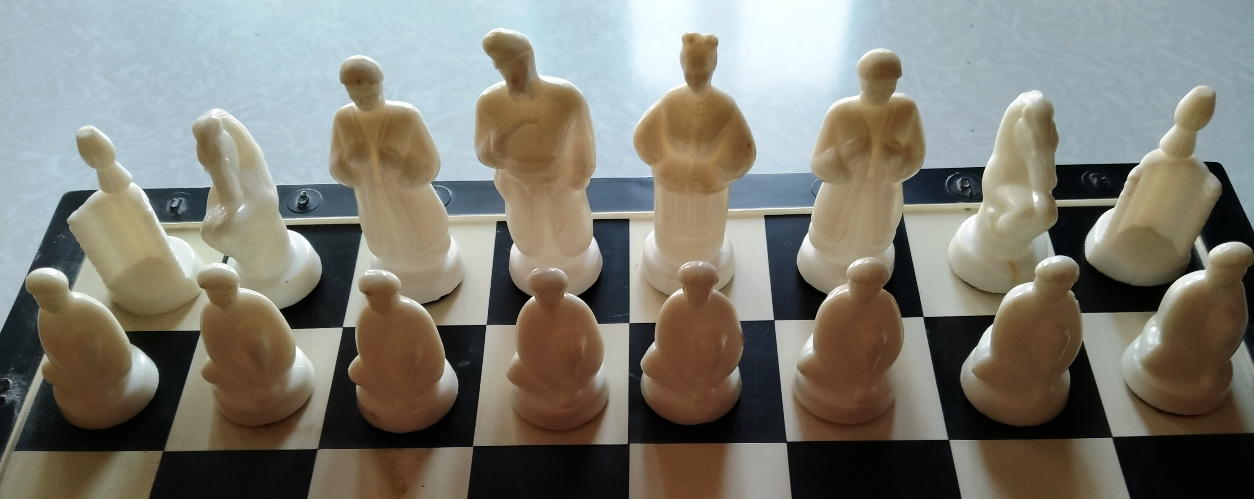 шахматные фигуры в украинской стилизации